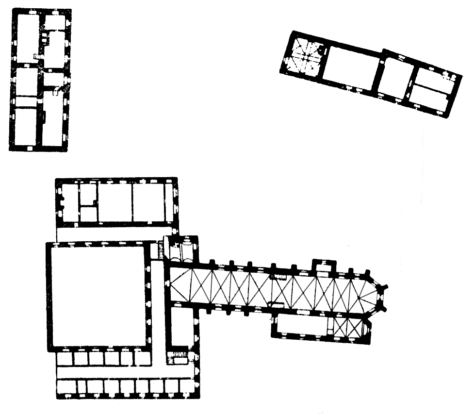 Nach Ludorff, A.: Klostergebäude (Besitzer: Graf von Fürstenberg-Herdringen). Nebengebäude, Reste, Renaissance, 18. Jahrhundert.